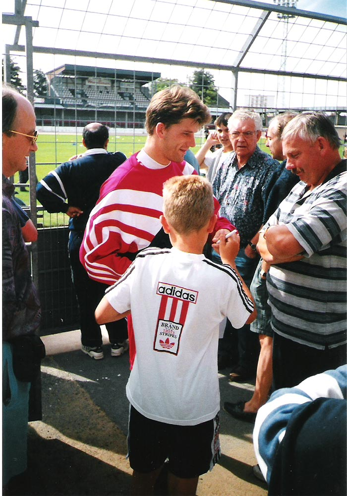 Jimmy Hébert